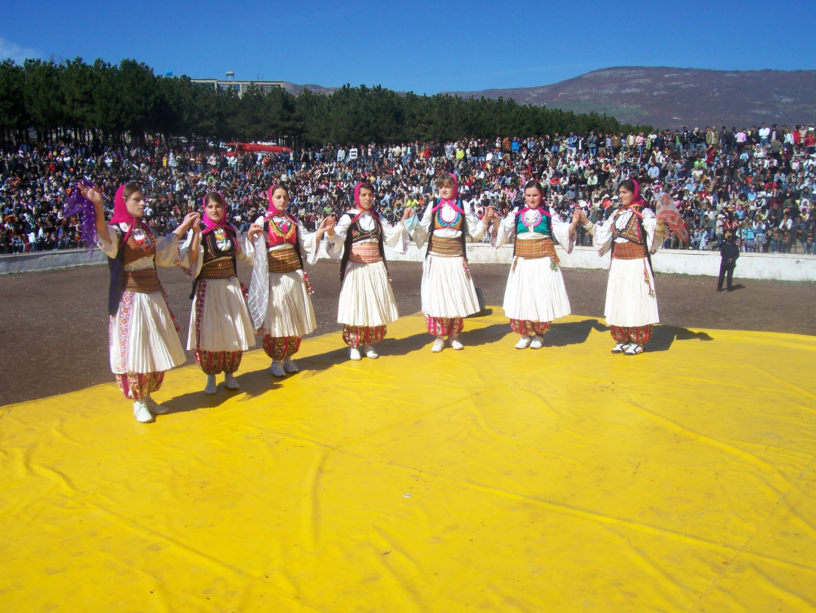 Valltare te shkolles se mesme "Bajram Abdiu", Bicaj gjate nje aktiviteti ne Kukes